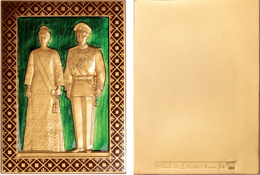 تمبر طلای پهلوی با نقش تمام قد محمدرضا و فرح پهلوی با مینای زمینه سبز و حاشیه قهوه ای به سفارش مؤسسه اعتباری دانشگاه